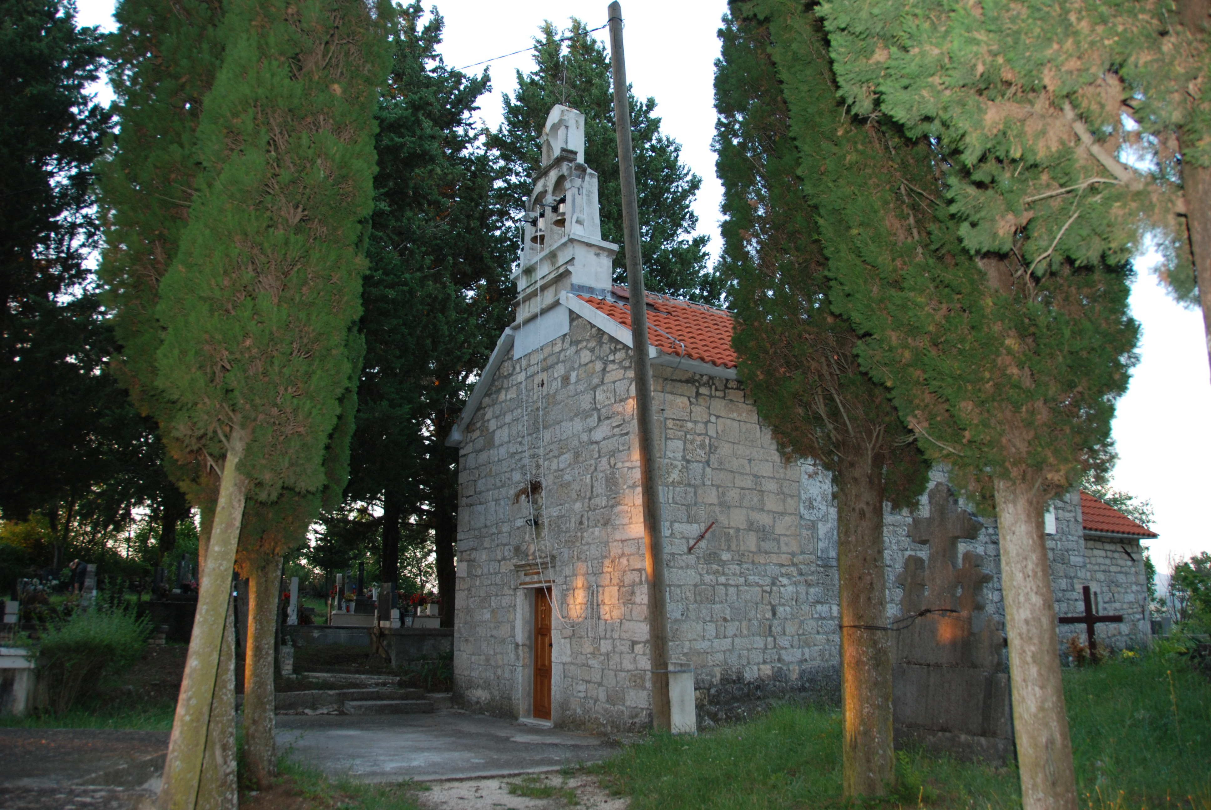 Pravoslavna crkva svetog Georgija u Kričkama kod Drniša.